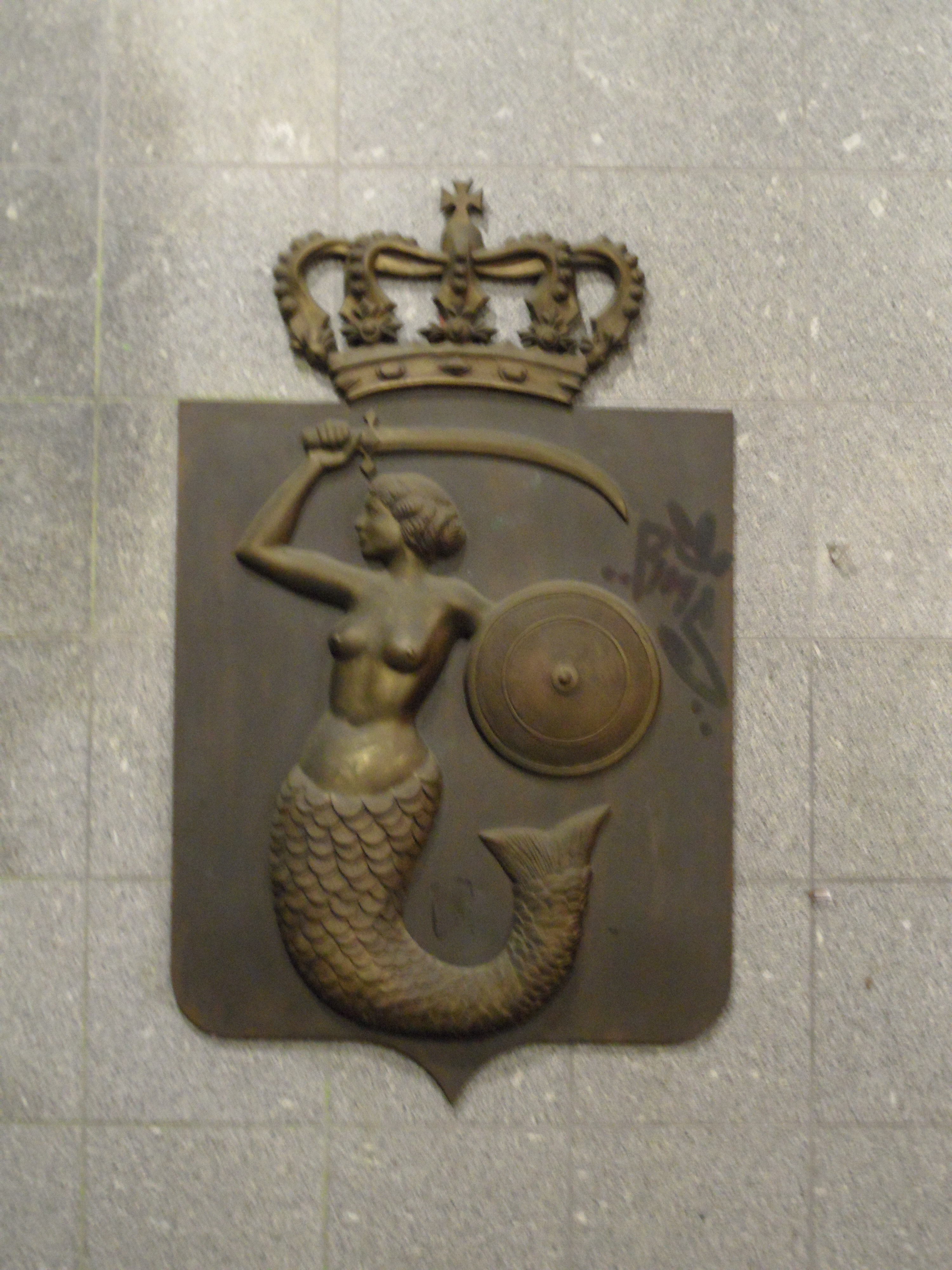 Berlin - U-Bahnhof Warschauer Straße - Linie U1